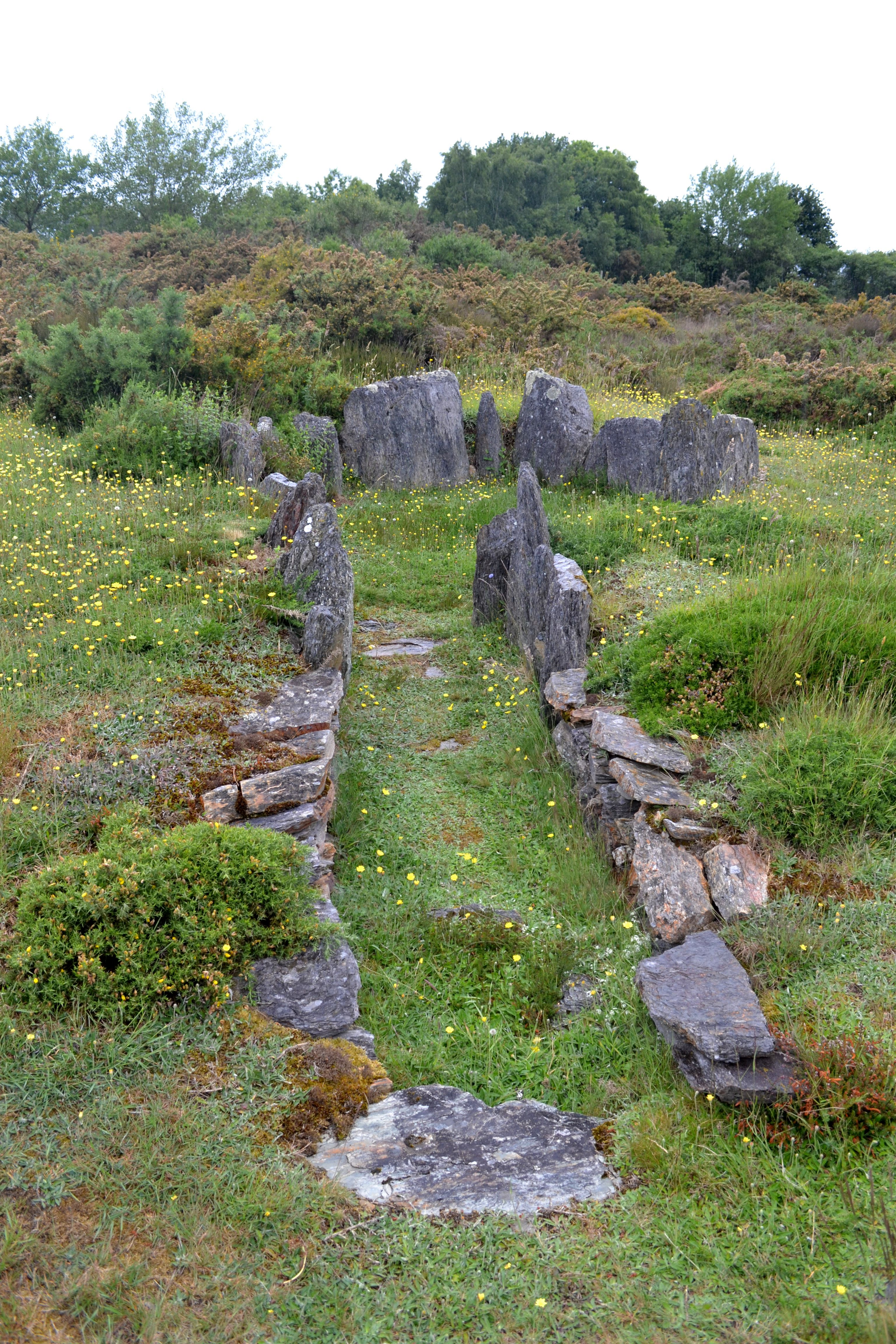 Dolmen sud de la Croix Saint-Pierre, Saint-Just (35).